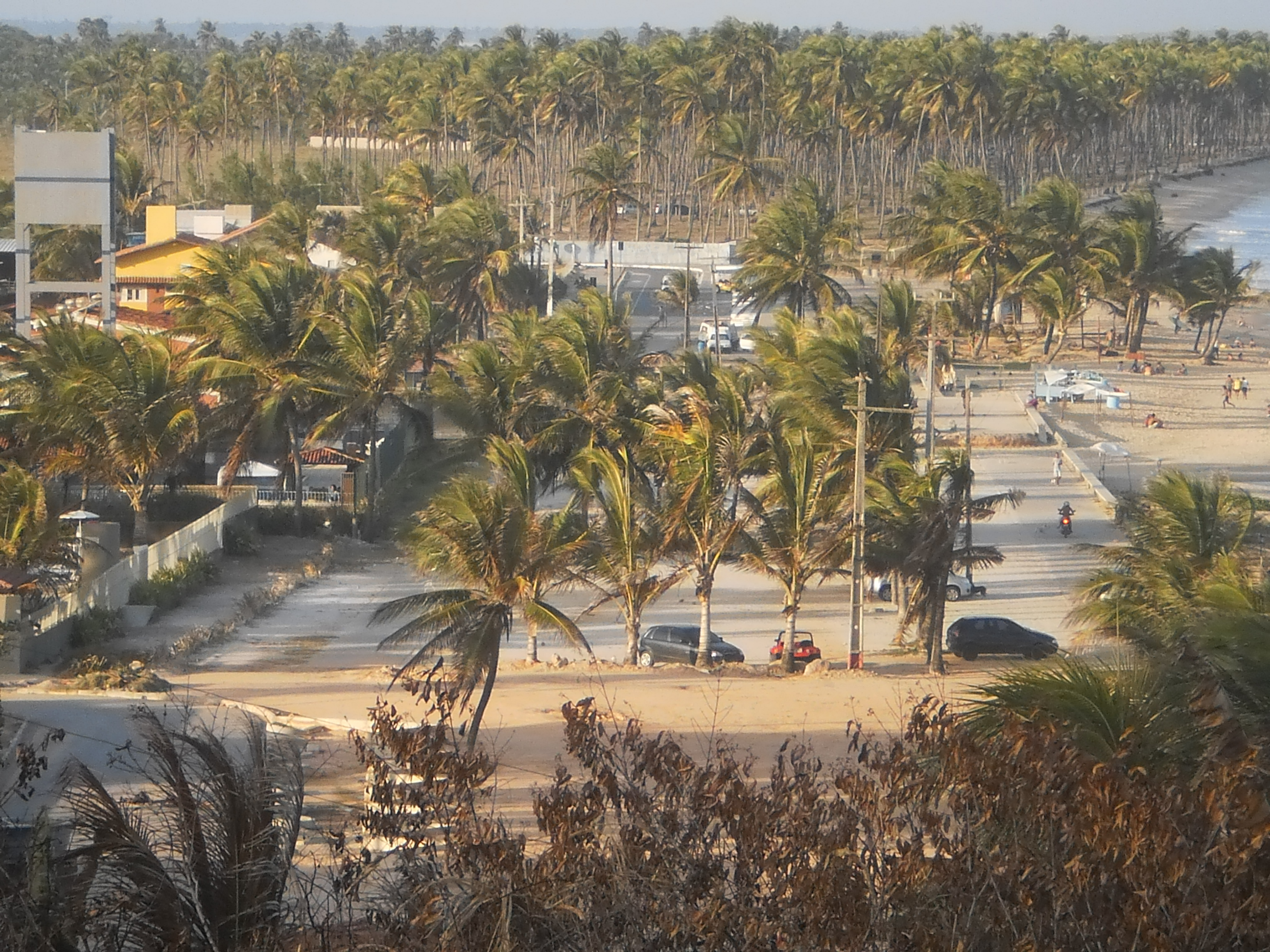 Praia de Itapuama no Cabo de Santo Agostinho.